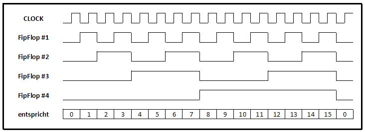 Zeitliniendiagramm eines asynchronen Hexadezimalzählers mit 4 FlipFlops (mit Trigger auf absteigender Flanke), vorwärts